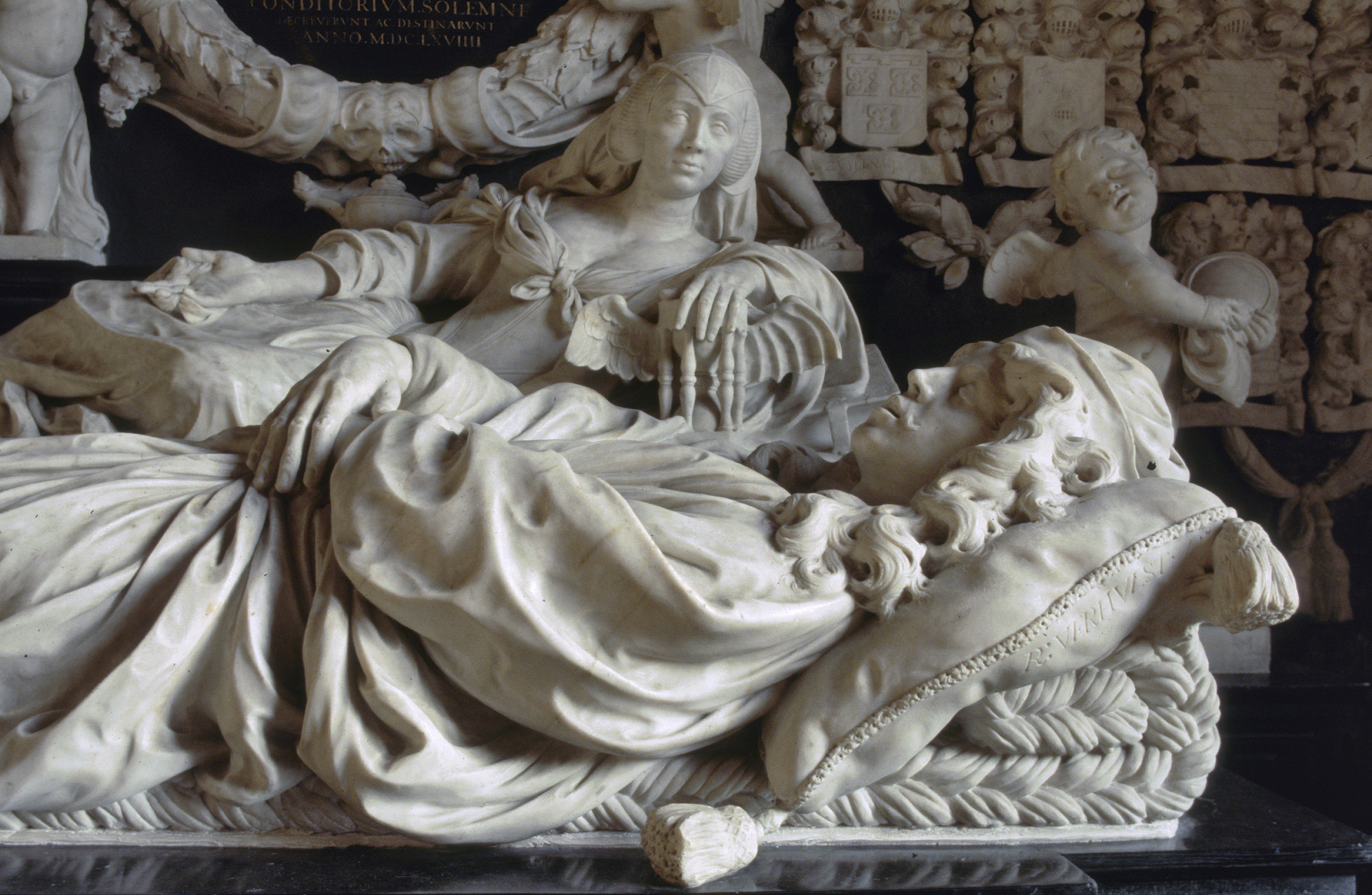 Nederlands Hervormde Kerk: Interieur, overzicht grafmonument Anna van Ewsum, detail